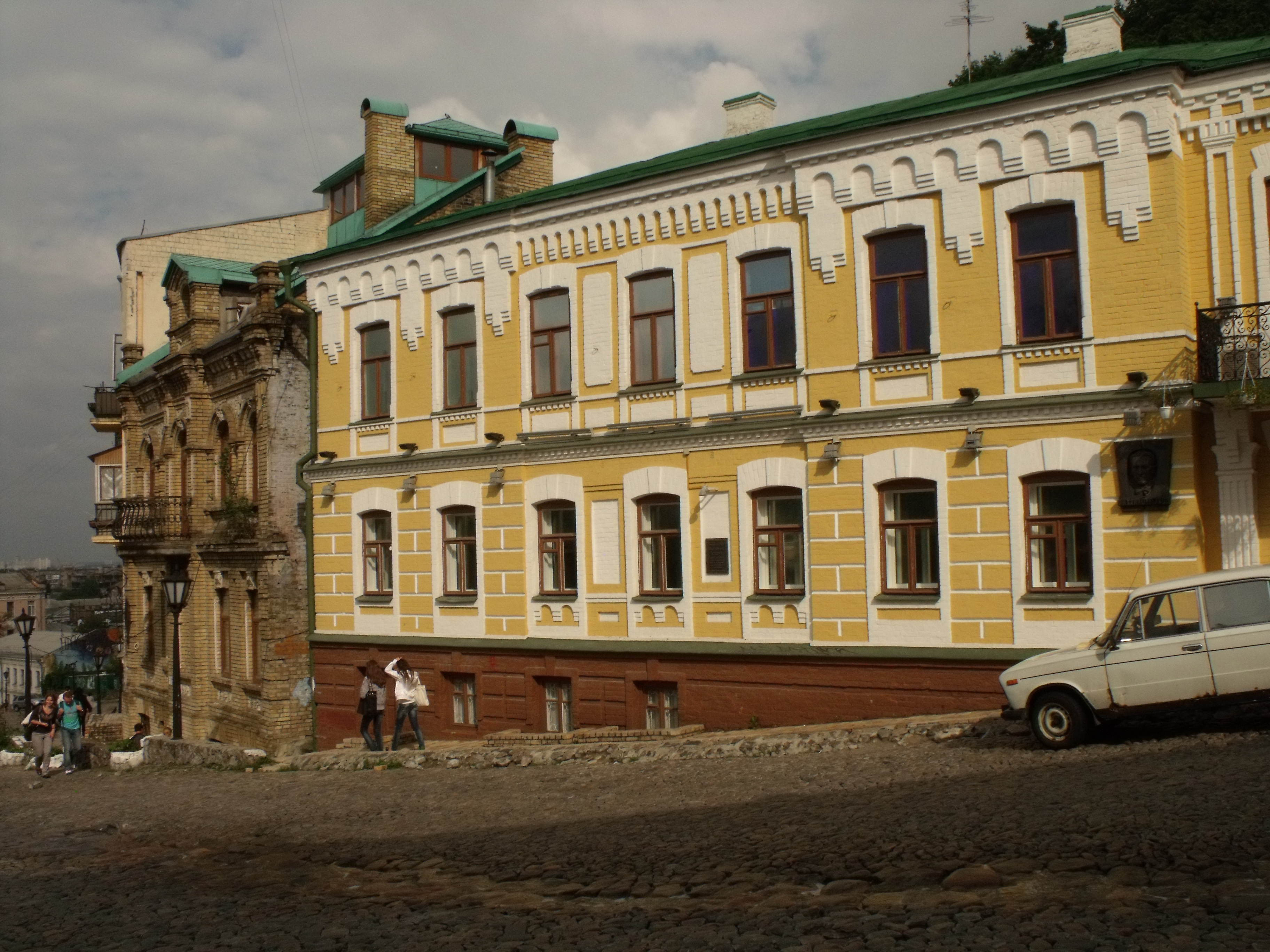 Будинок житловий, в якому у 1906—1919 рр. мешкали М. О. Булгаков, радянський письменник; родина Булгакових; у 1906 р. О. А. Кошиць, композитор, хоровий диригент; В. П. Листовничий, цивільний інженер, архітектор